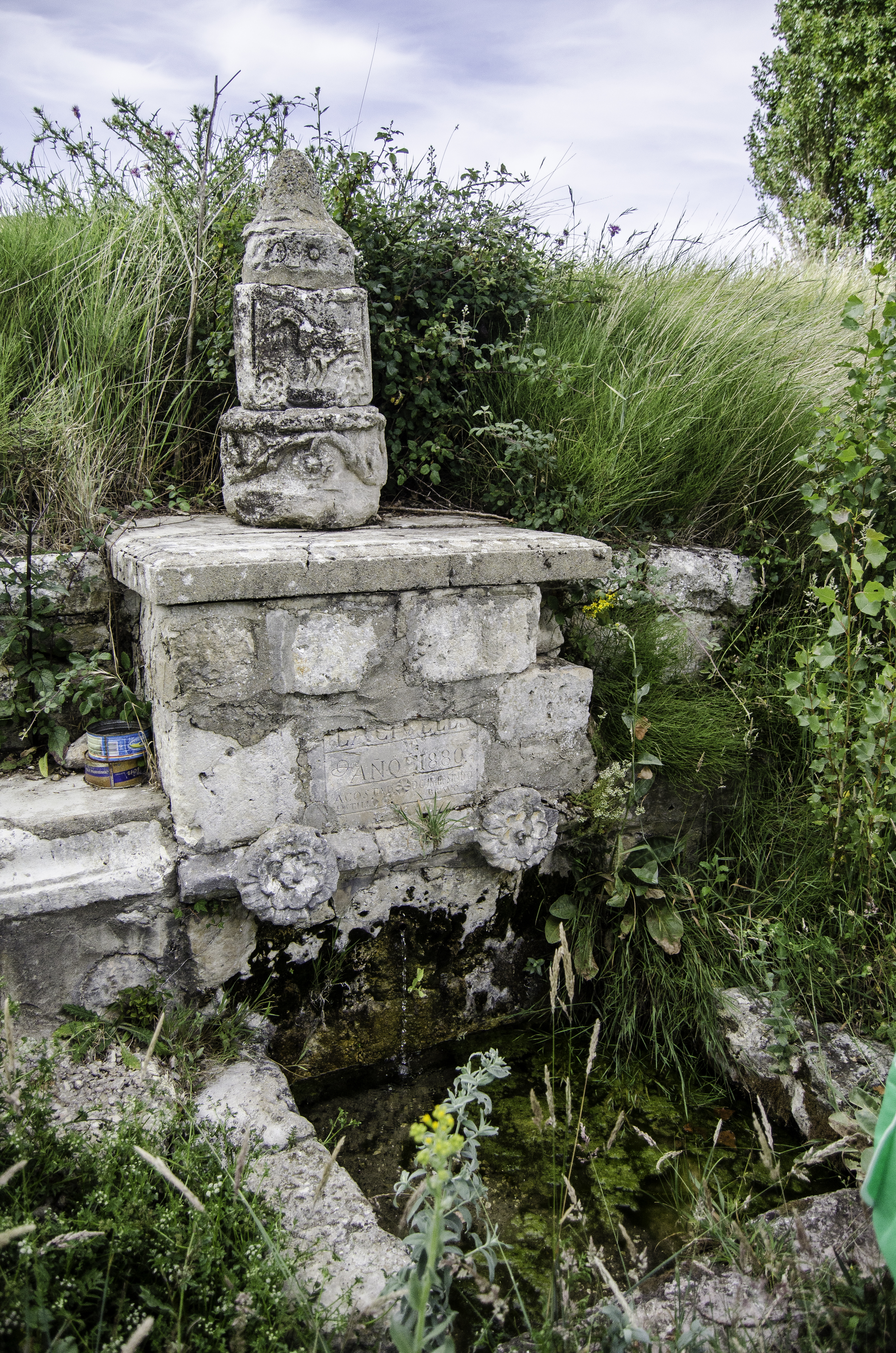 Fuente de la Cibeles en Rioparaíso (Burgos). Pequeña fuente erigida en 1880.